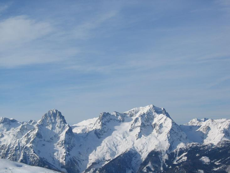 Spitzmauer u Grosser Priel, selbst fotografiert, GNU-FDL